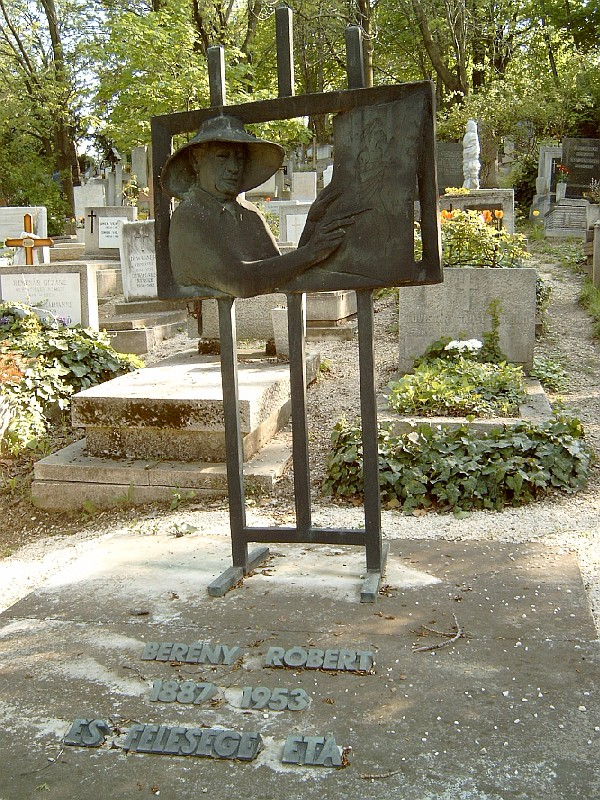 Berény Róbert síremléke. A festőművészt megmintázó bronz alkotás. Budapesten. Farkasréti temető: 21/1-1-25/26. Lesenyei Márta szobrászművész alkotása (1975)